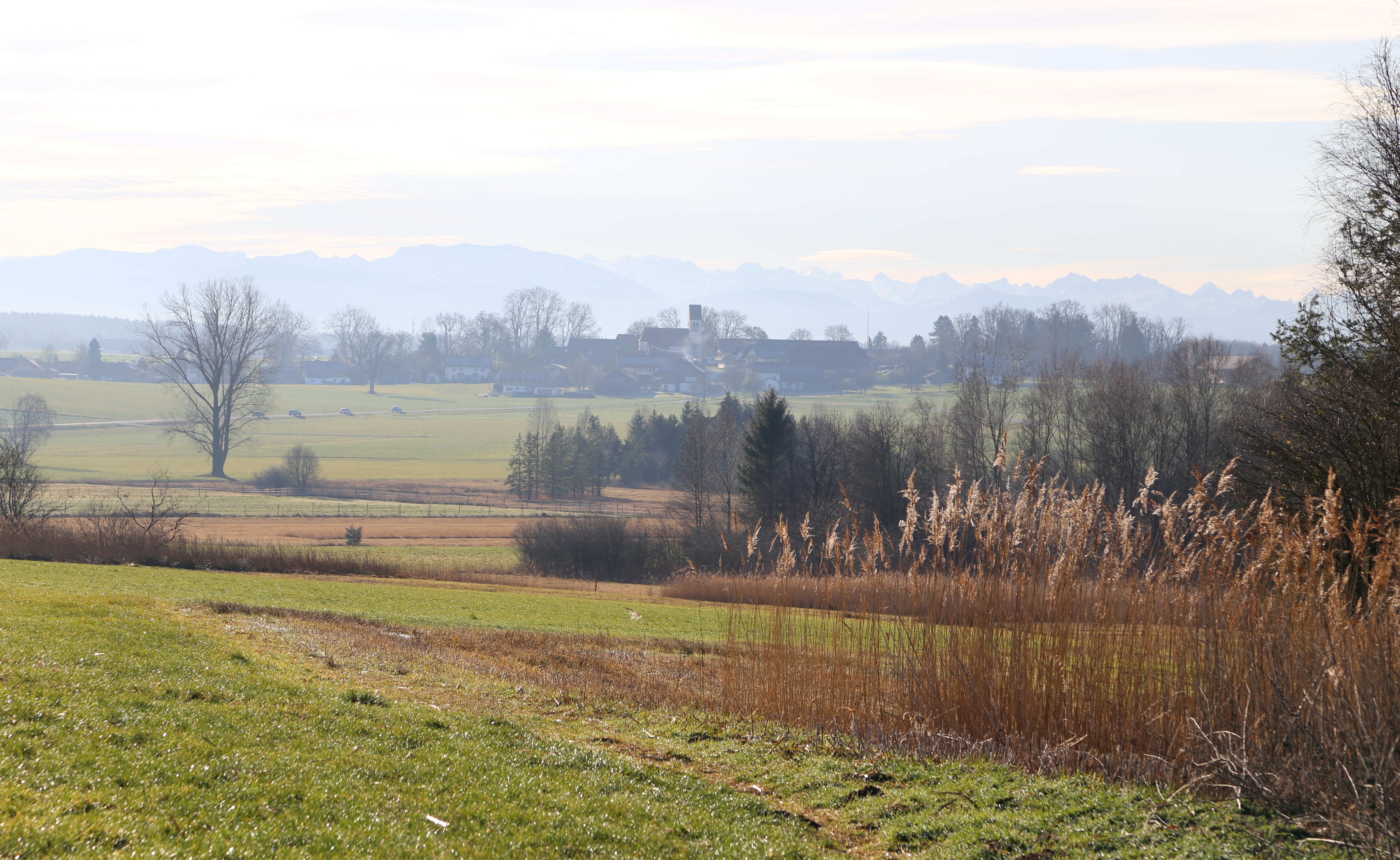 Landschaftsschutzgebiet Schönberg, Egling LSG-00264.01